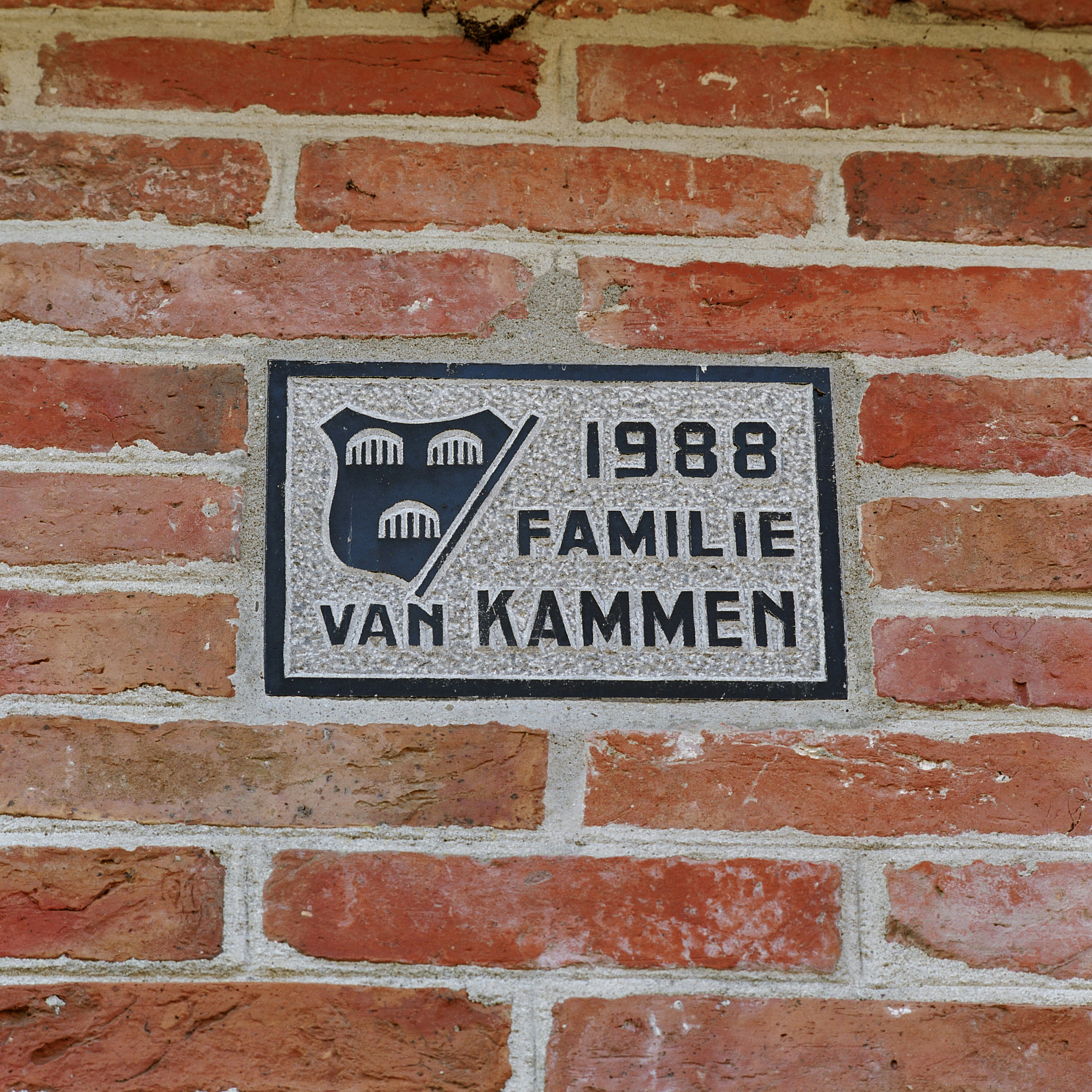 Woonhuis/ Metselwerk: Detail oostgevel: gevelsteen met familienaam